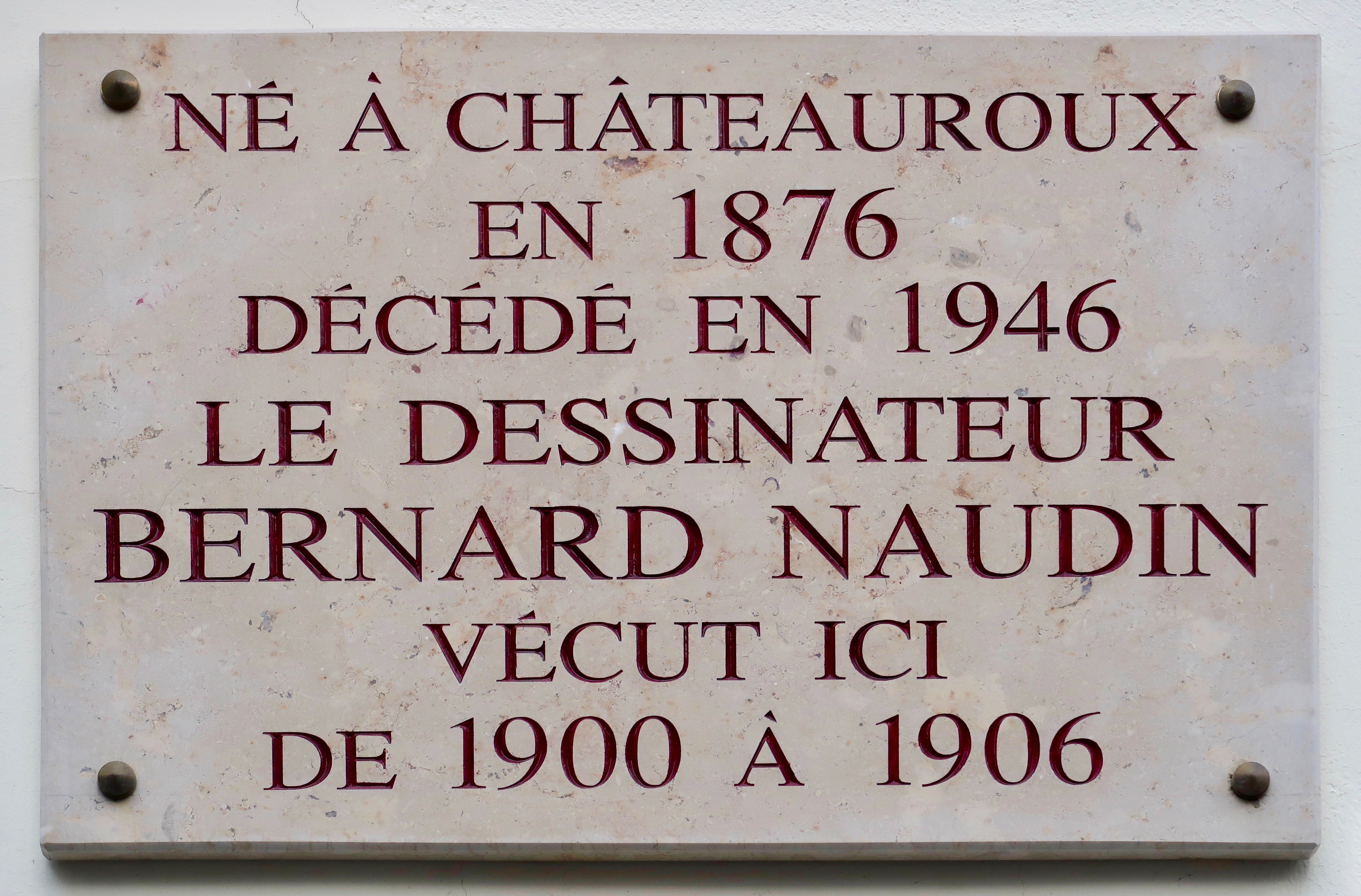 Plaque en hommage à Bernard Naudin, 13 bis rue Campagne-Première (Paris 14e).